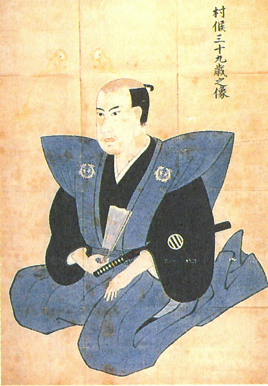 伊達村候の肖像。